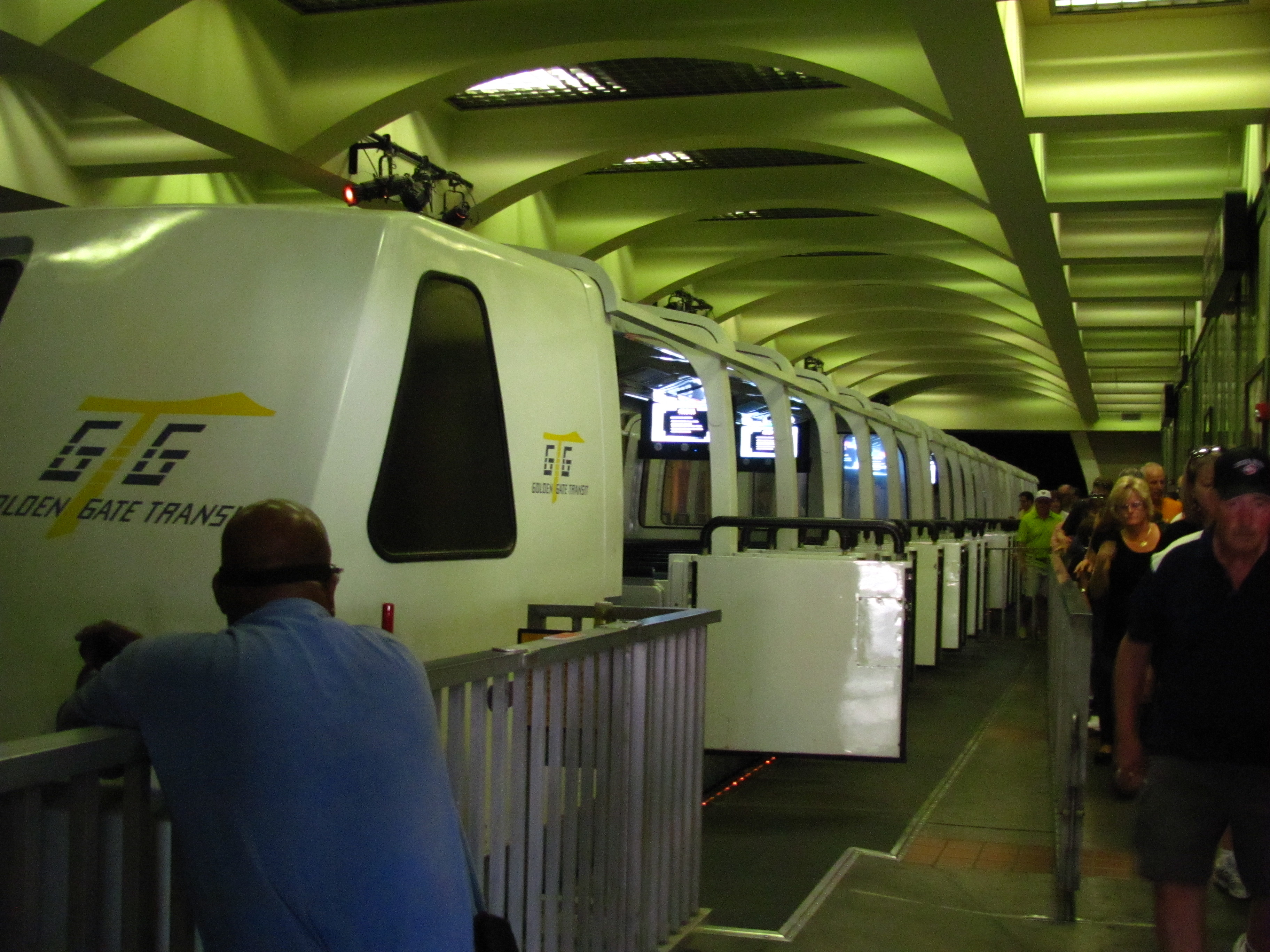 Disaster!